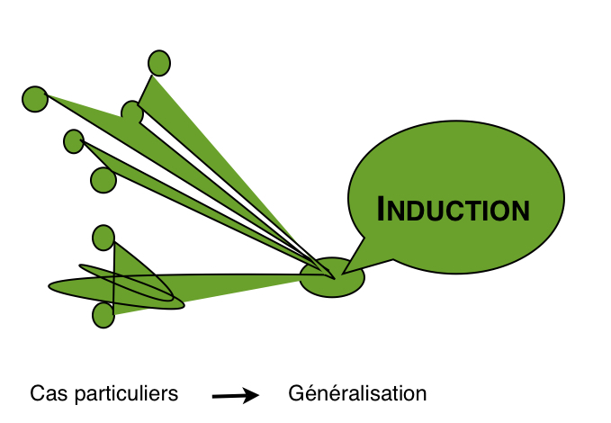 Qu'est-ce qu'une induction ? Représentation graphique.